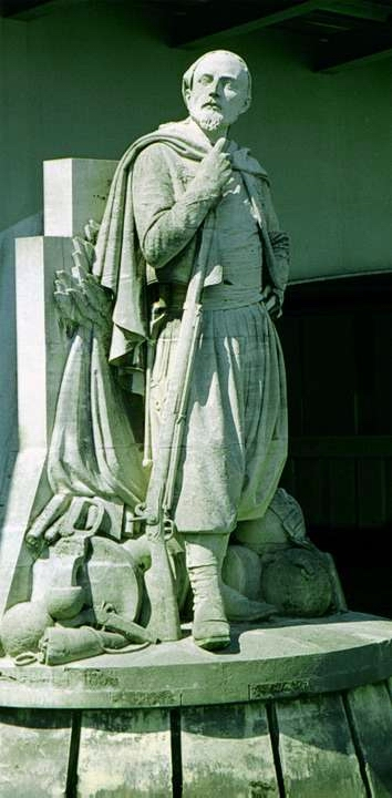 Le Zouave du pont de l'Alma par Georges Diebolt, les pieds au sec.